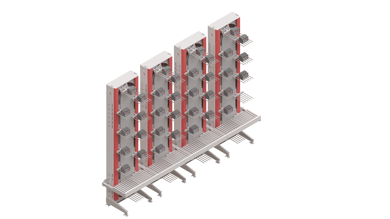 Koppeling van meerdere paternosterliften voor inzet als buffer.